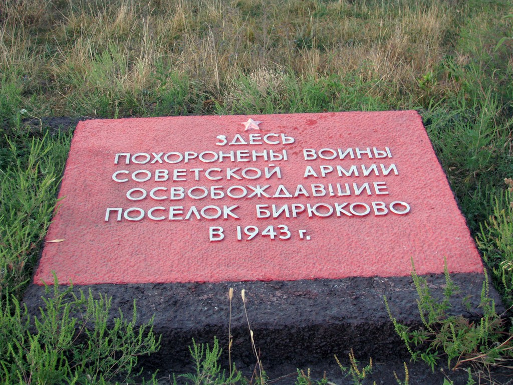 Мемориальная плита в память погибшим во второй мировой войне в Бирюково